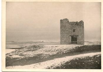 Antiguo molino de Pinarejo, en la actualidad rehabilitado como centro cultural.